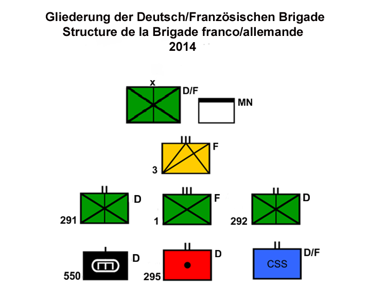 Gliederung der deutsch-französischen Brigade im Jahre 2014